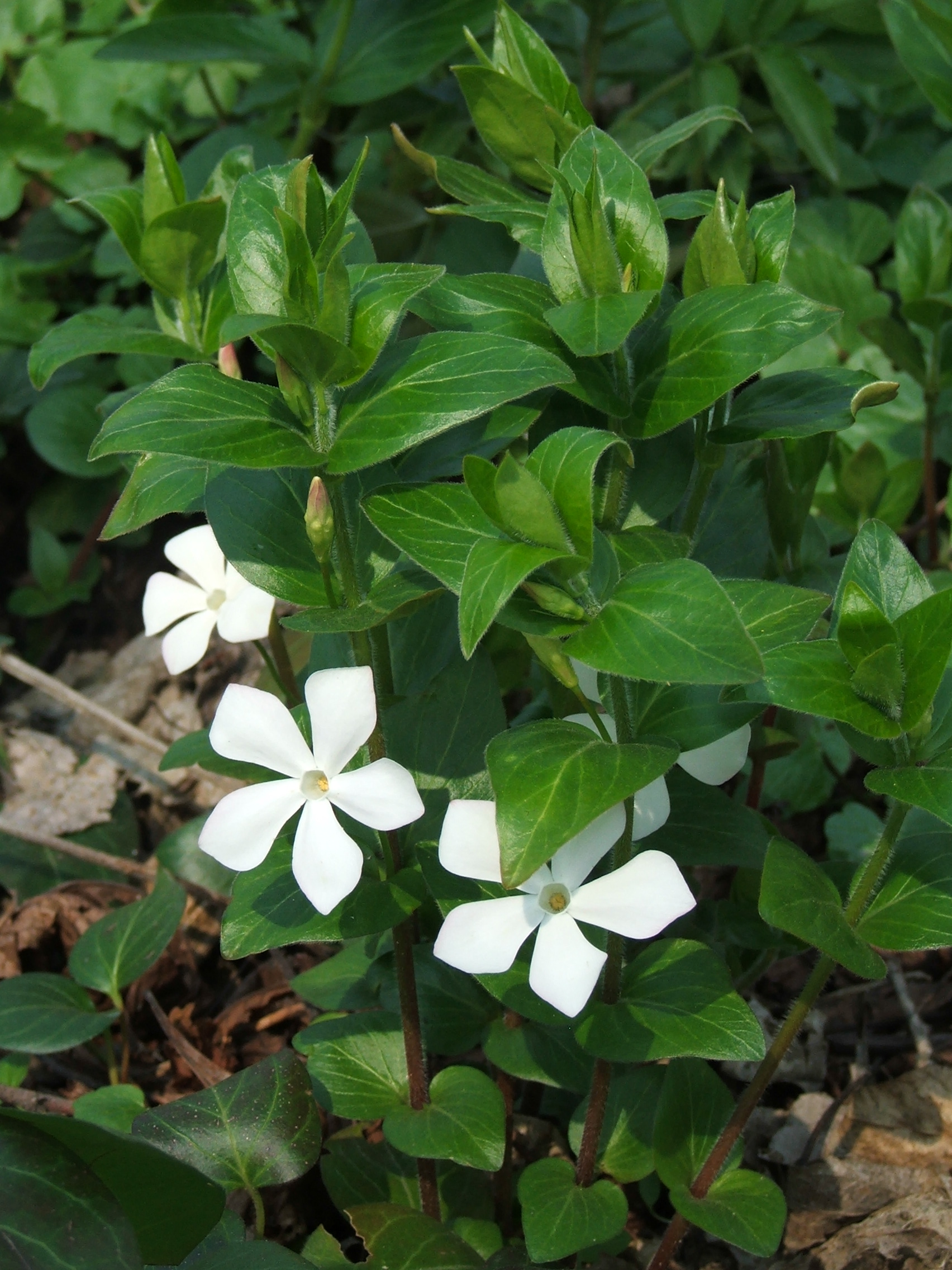 Vinca major L. var. alba MTA Botanic Garden Vácrátót, Hungary.